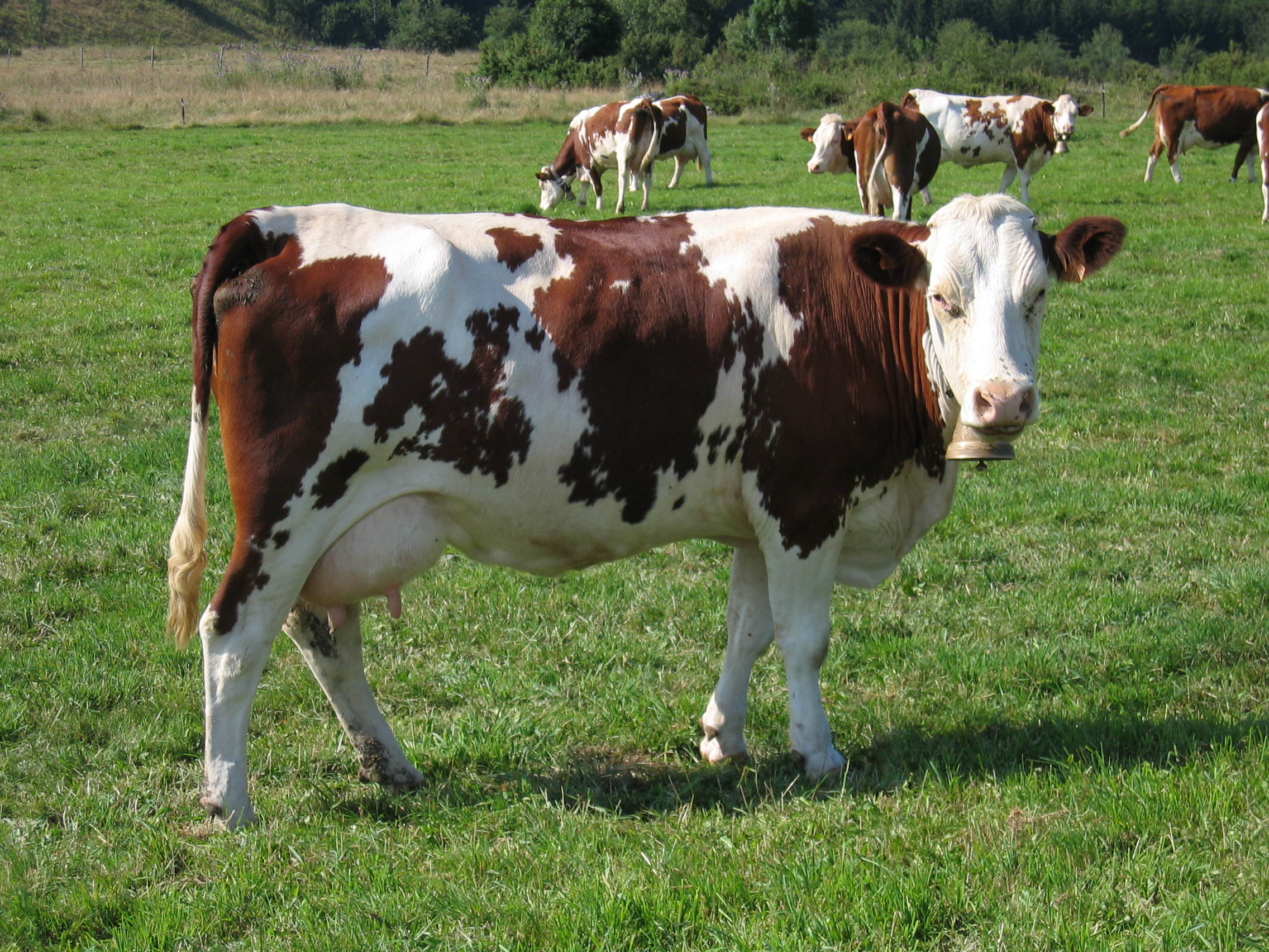 une montbéliarde dans un champ, avec sa cloche Obertino en bronze